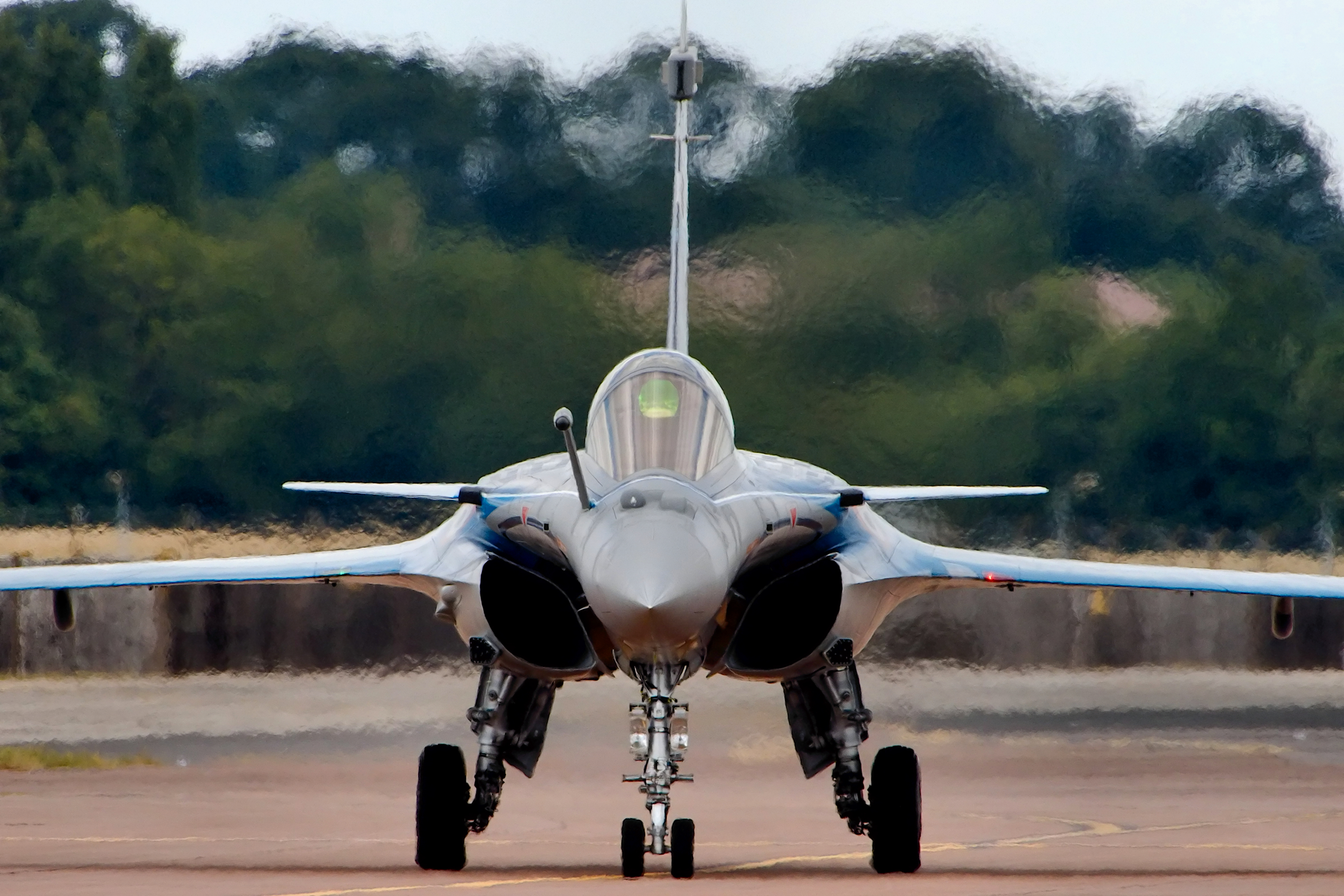 Rafale - RIAT 2017